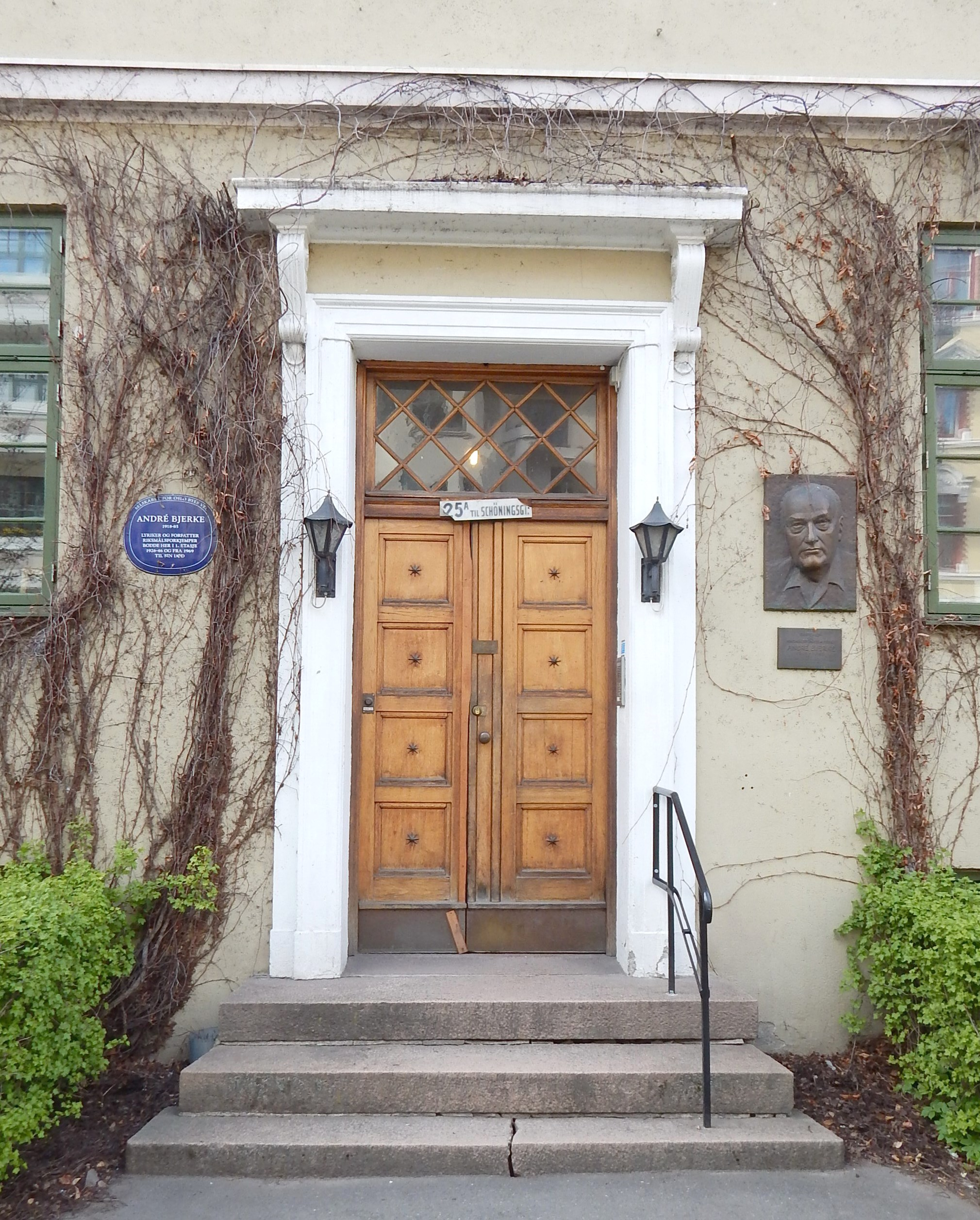 Schønings gate 25 (inngang fra Jacob Aalls gate), André Bjerkes hjem i en årrekke